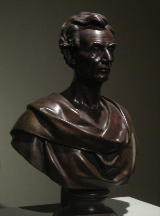 Abraham Lincoln